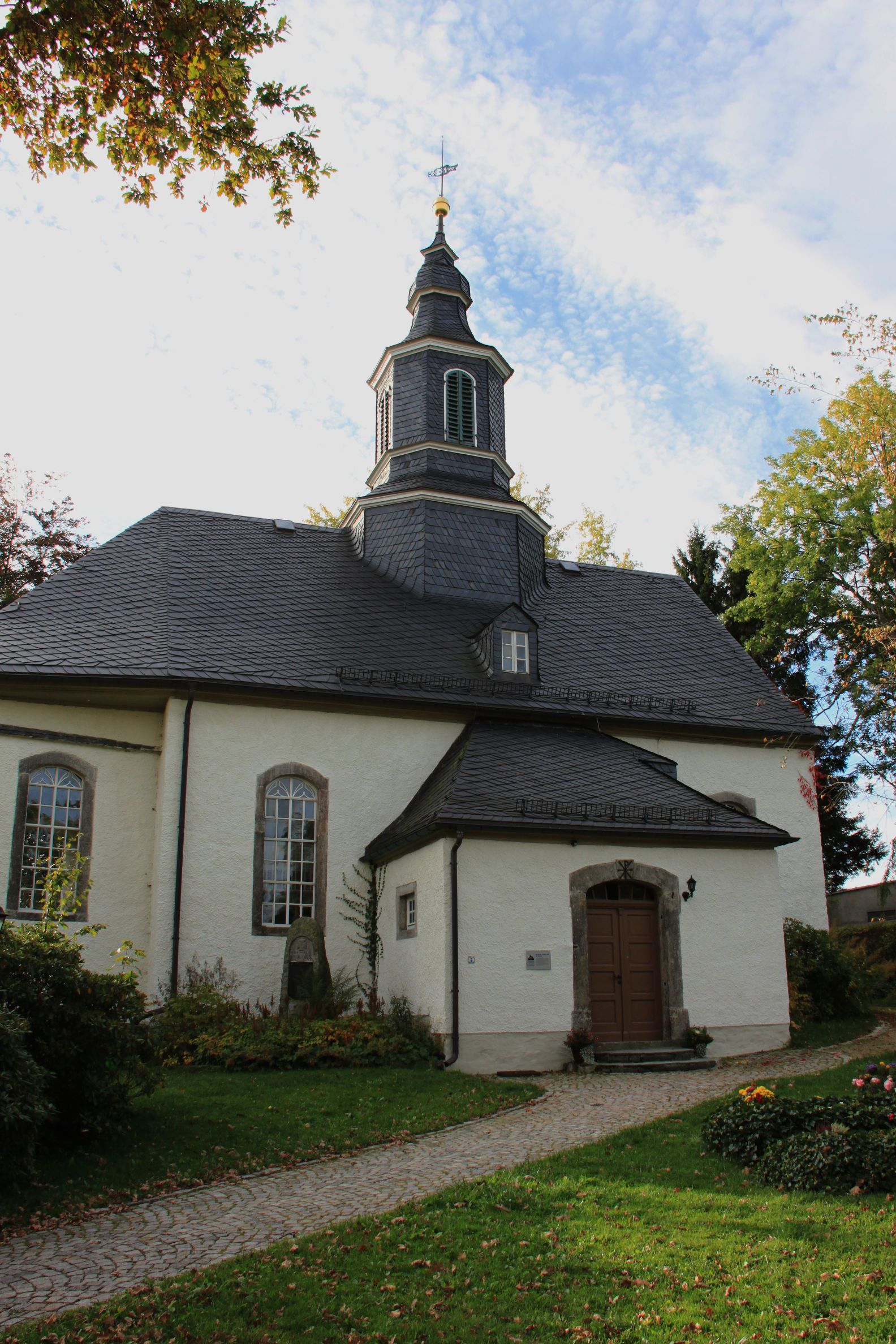 Kirche in Schneeberg OT Griesbach im Erzgebirge